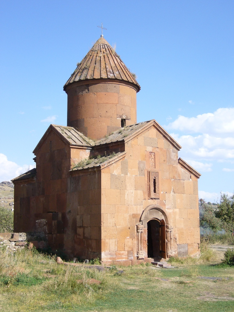 Petite église de Marmashen (à coté de l'église principale)